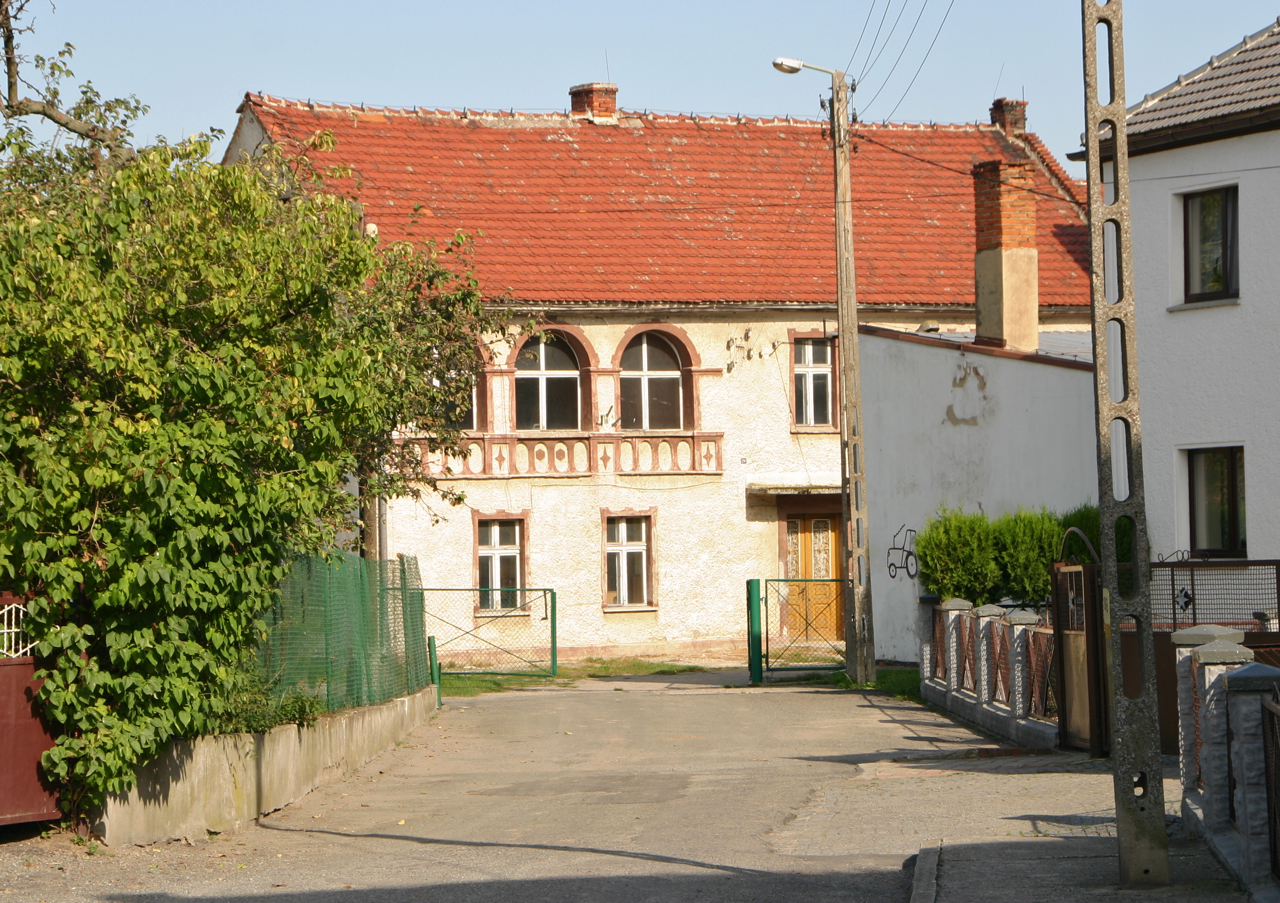 Mionów (dodatkowa nazwa w j. niem. Polnisch Müllmen) – wieś w Polsce położona w województwie opolskim, w w powiecie prudnickim, w gminie Głogówek.